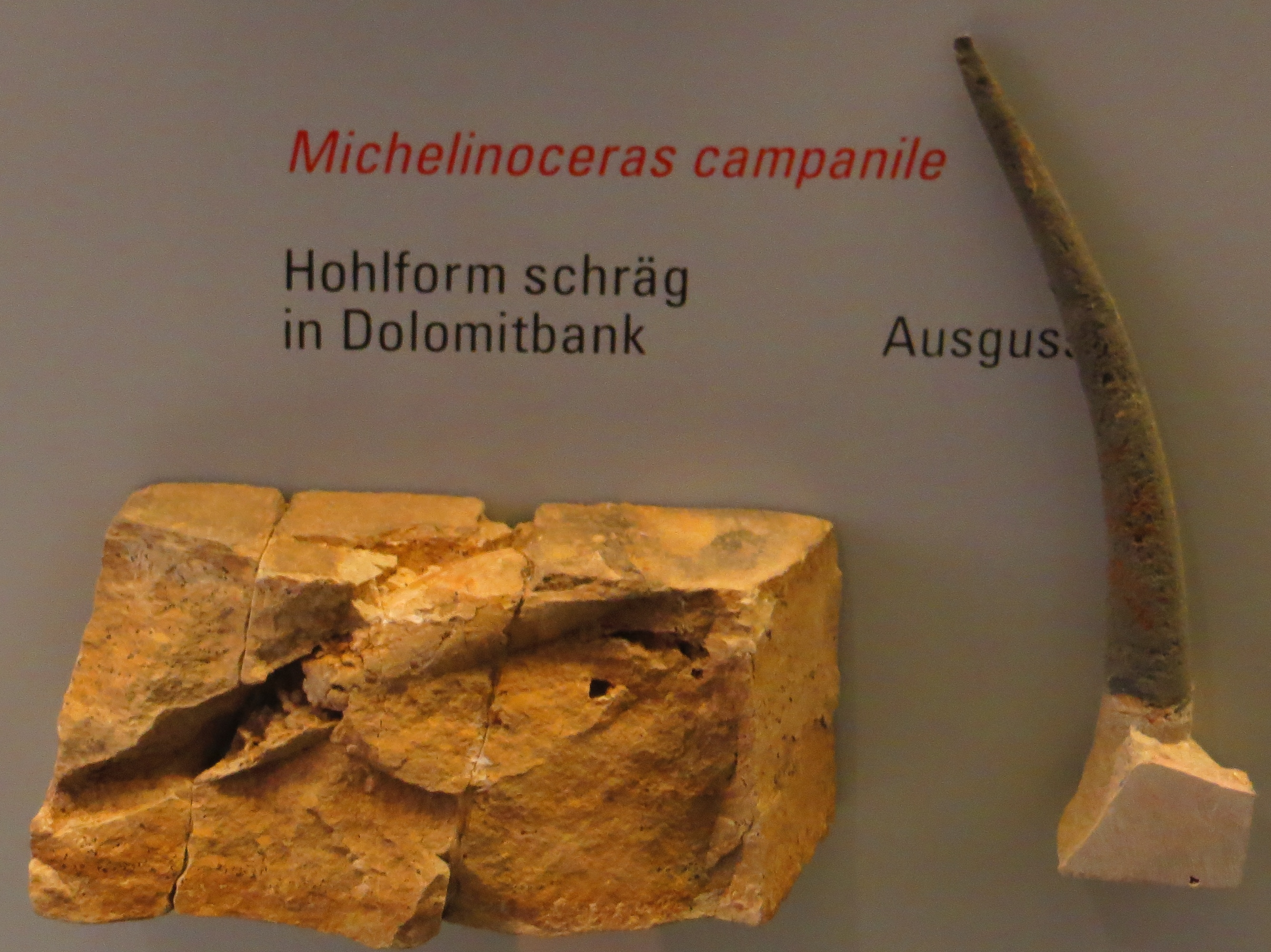 Fossil - Took the picture at Museum of Paleontology, Zurich